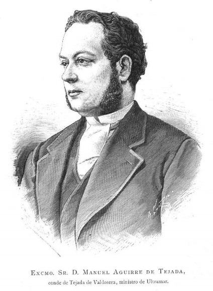 Grabado de Manuel Aguirre de Tejada